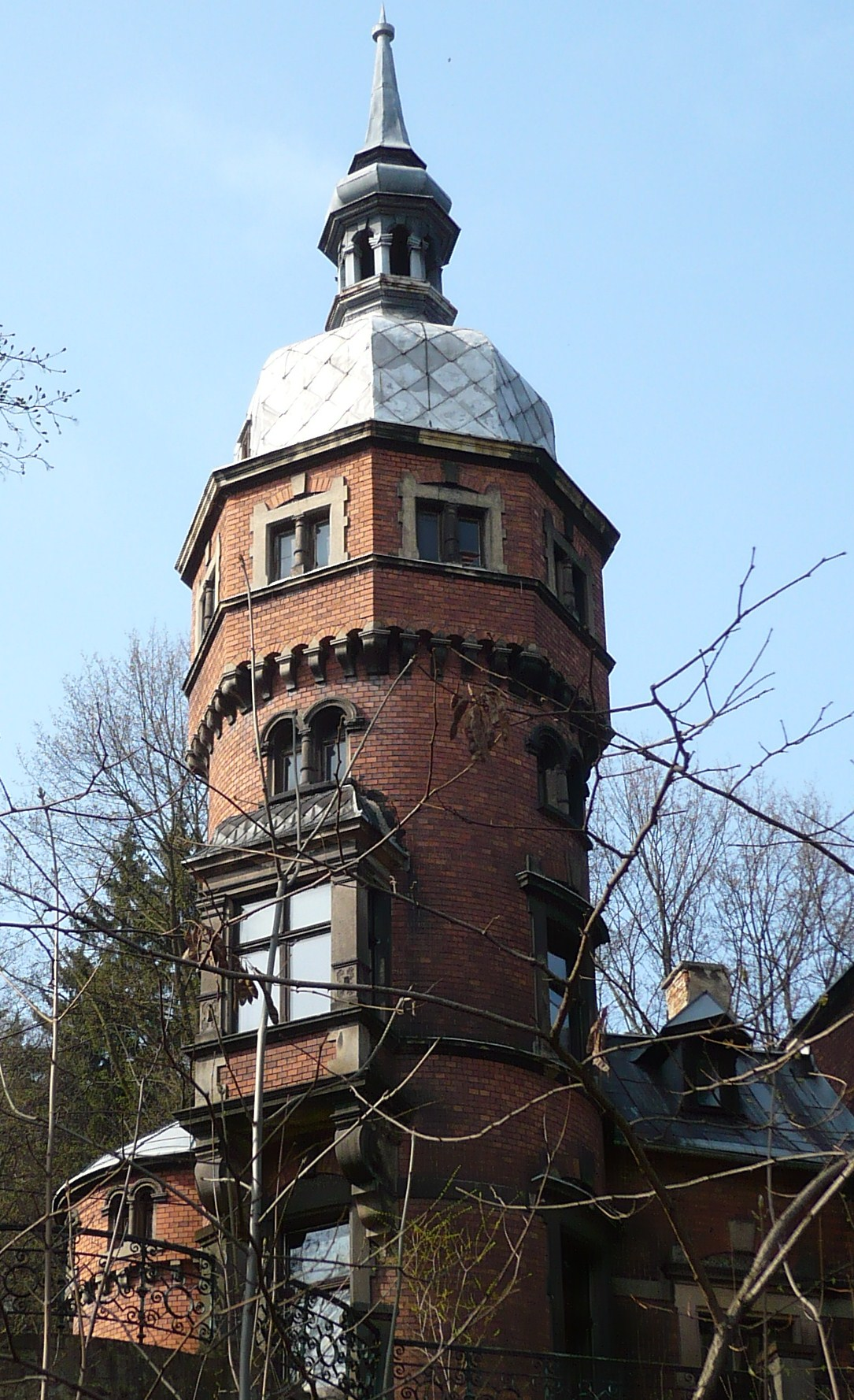 Nowa Ruda, ul. Piłsudskiego 20 - willa „Konrad”, 1890 (zabytek nr A/936/972/WŁ z 8.12.1983)